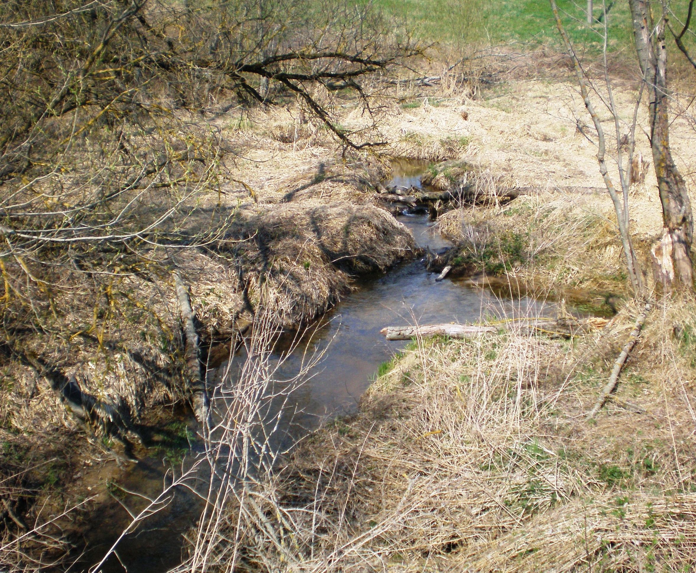 Upelis Žiedupė prie Pažiedupio kaimo, Josvainių sen., Kėdainių raj.